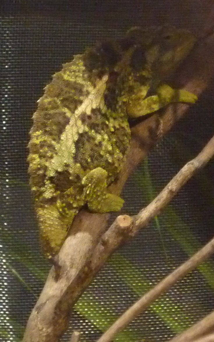 iZooから期間限定でマークイズみなとみらいのイベント展示に登場していました。(現在は終了しています。)具体的には、そのイベントの名前は、みなとみらiZooです。